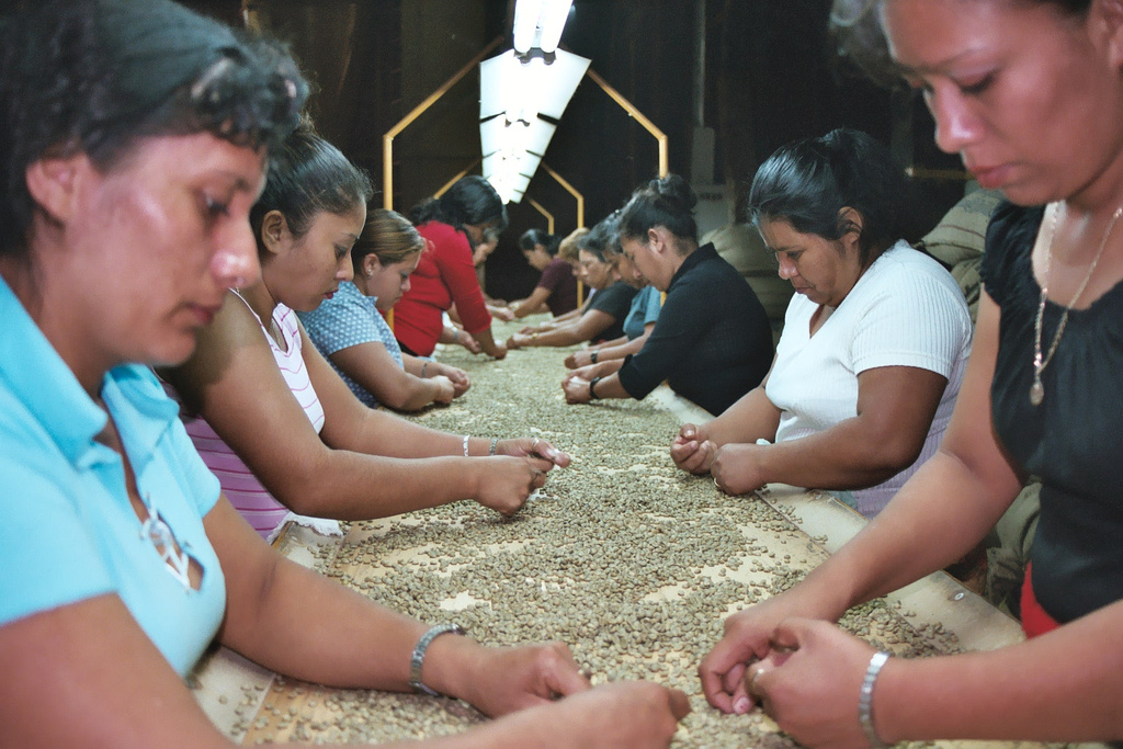 Coffee in El Salvador